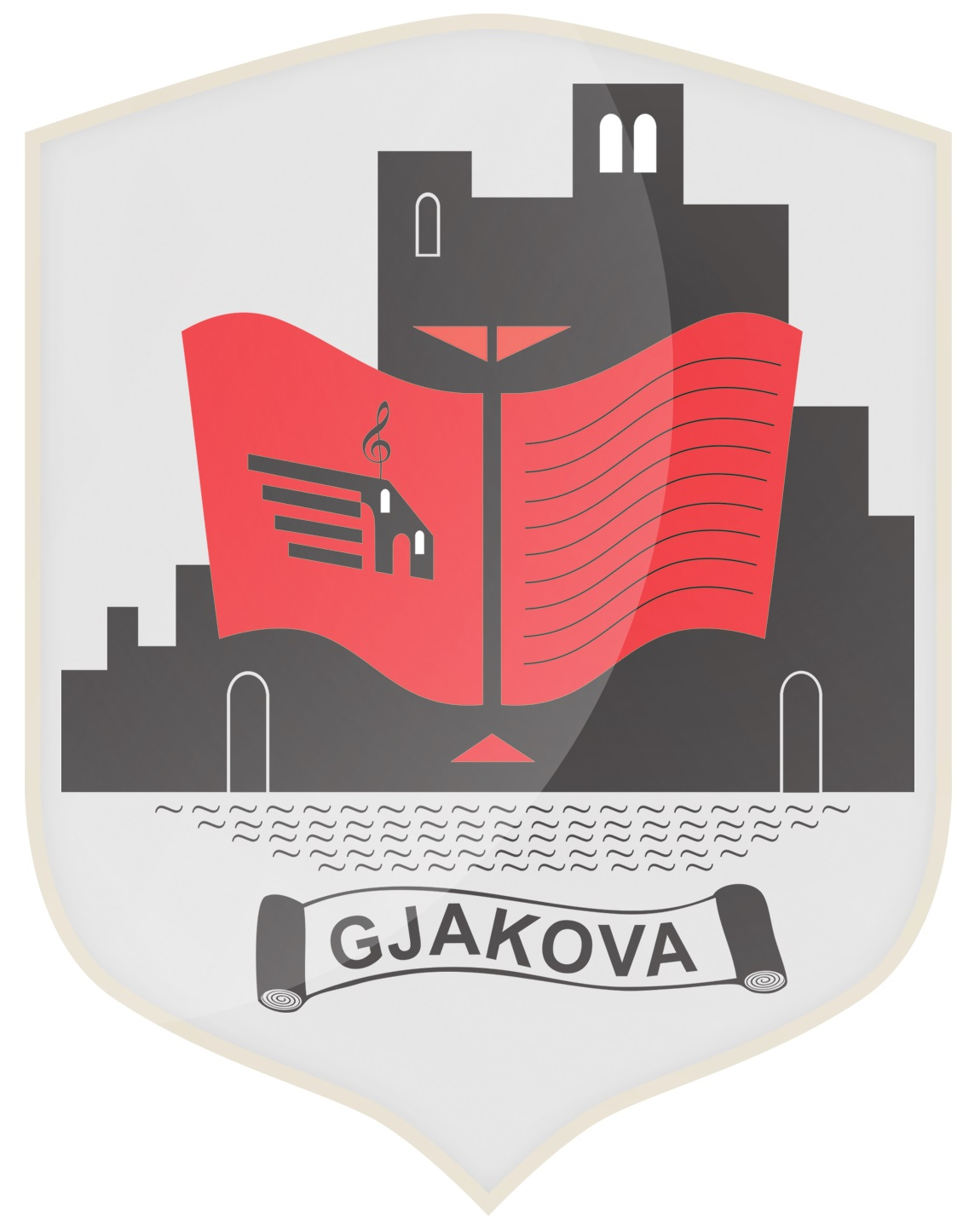 Offizielles Wappen der Großgemeinde (Komuna/Opština) von Gjakova/Đakovica (Kosovo)